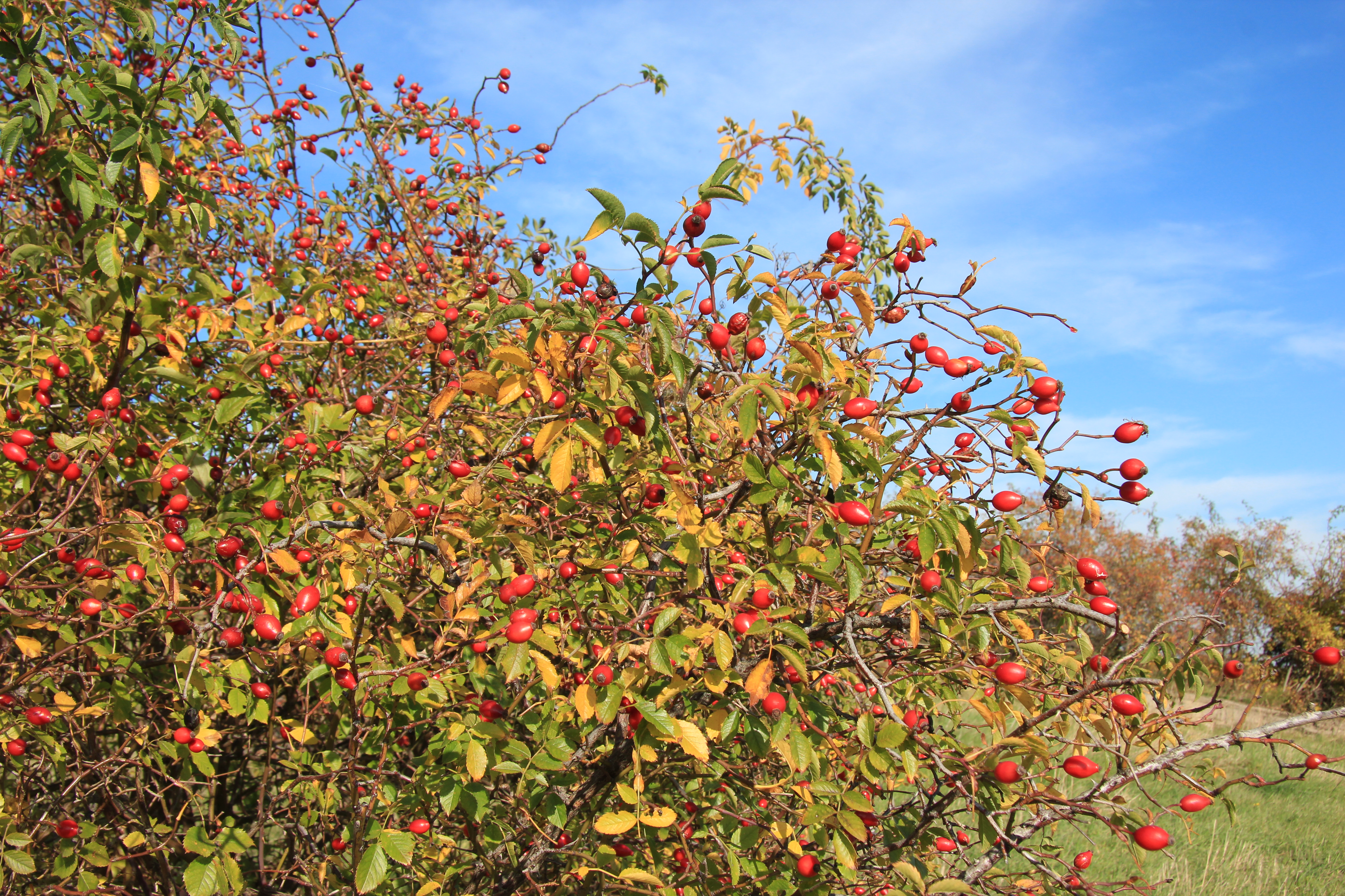 Nach der Lese in den Weingärten von Pfaffstätten, Niederösterreich